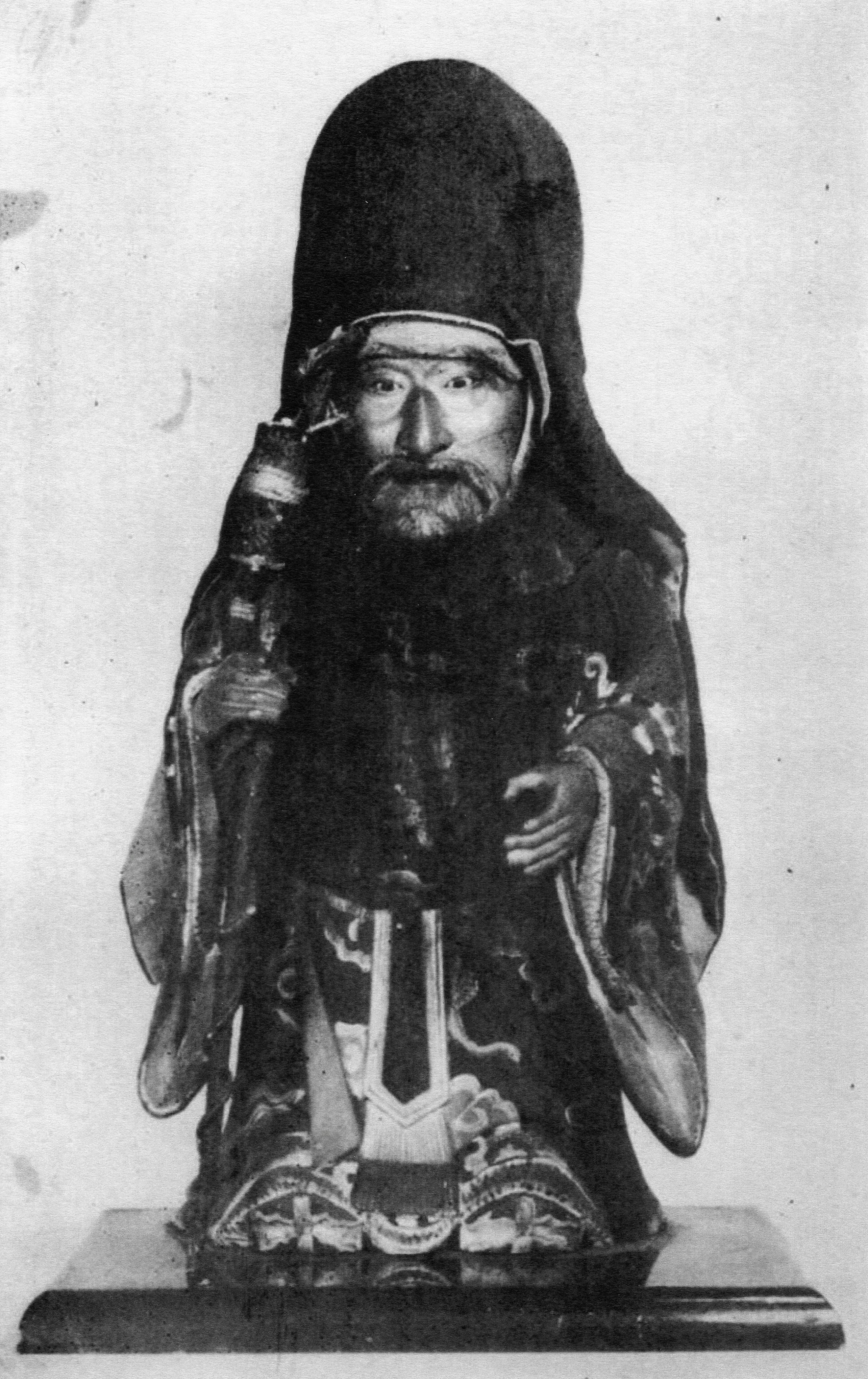 鴨方藩初代藩主池田政言の木像。